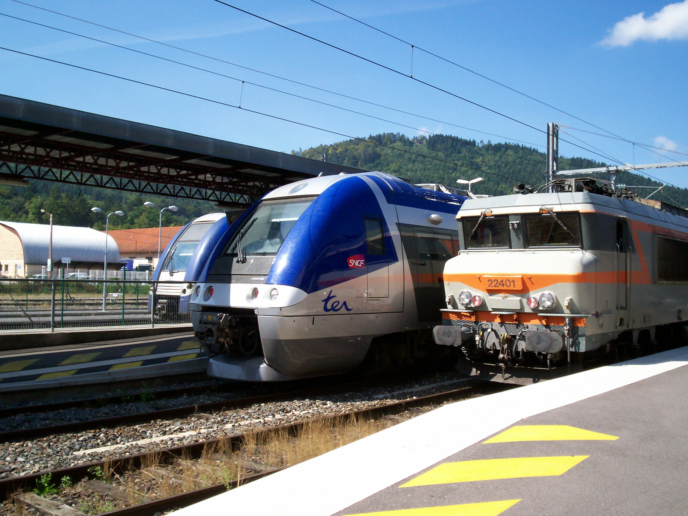 TER Lorraine